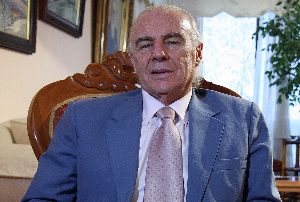 Jorge Lavandero Illanes, Senador: en su departamento.